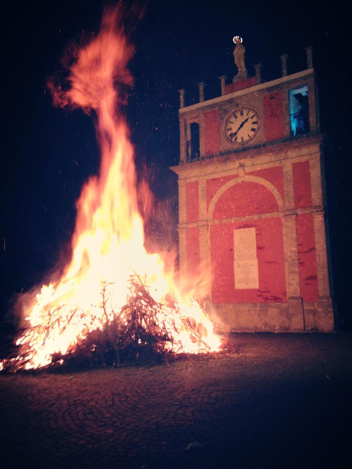 Falò di San Sebastiano 2013 in Piazza Orologio. Accadia (FG)